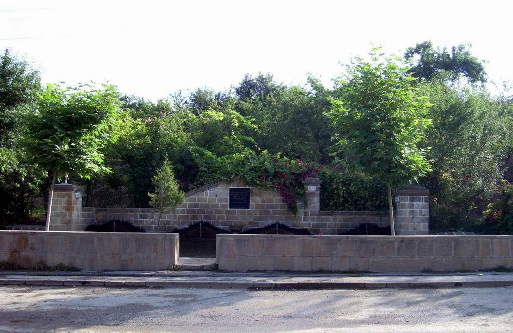 Əngəxaran bulağı